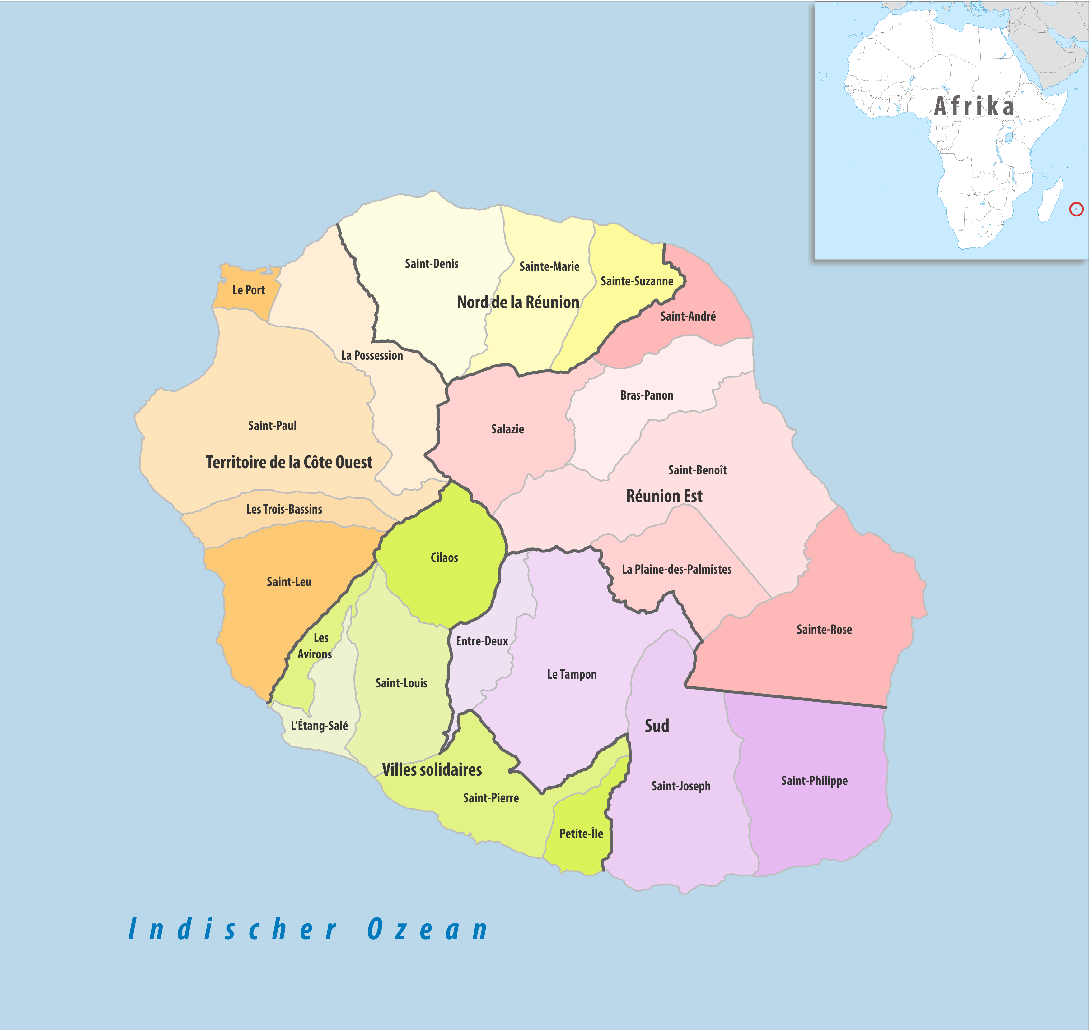 Gemeinden und Gemeindeverbände in Réunion